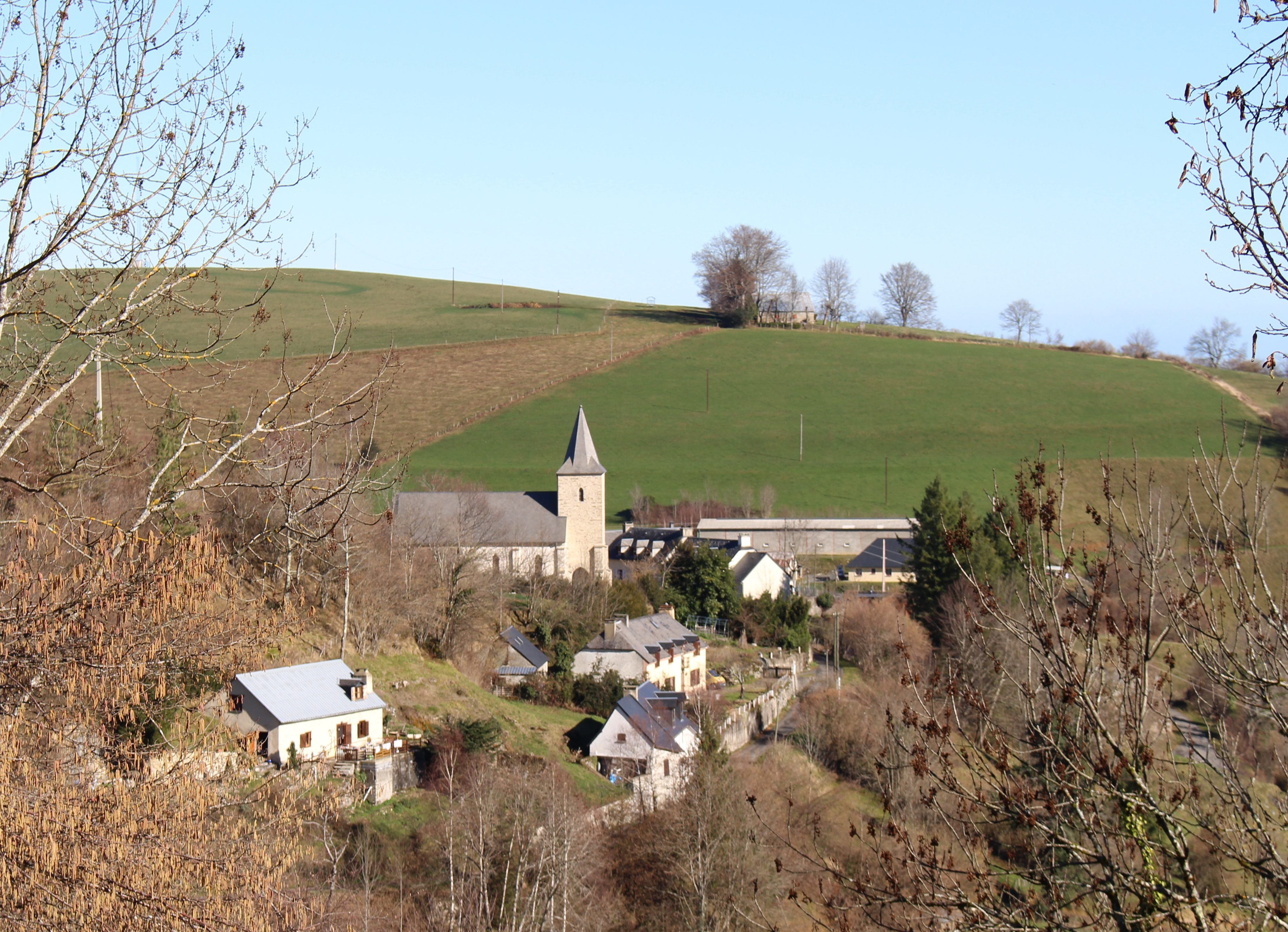 Germs-sur-l'Oussouet (Hautes-Pyrénées)